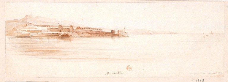 Type : image fixe, monographie Titre(s) : Marseille (Bouches du Rhône) [Image fixe numérisée] : [dessin] Publication : [19e siècle] Description matérielle : Dessin à la mine de plomb et lavis à l'encre brune ; 12,5 x 36,3 cm Note(s) : Cote : BNF Richelieu Estampes et photographie Rés. Ve-26s-Fol. *Destailleur Province, t. 14, n. 3531 . microfilm A033819 Sujet(s) : Paysages -- 19e siècle Phares Lazarets Marseille (Bouches-du-Rhône) -- La Joliette Méditerranée (mer) Notice n° : FRBNF38647443